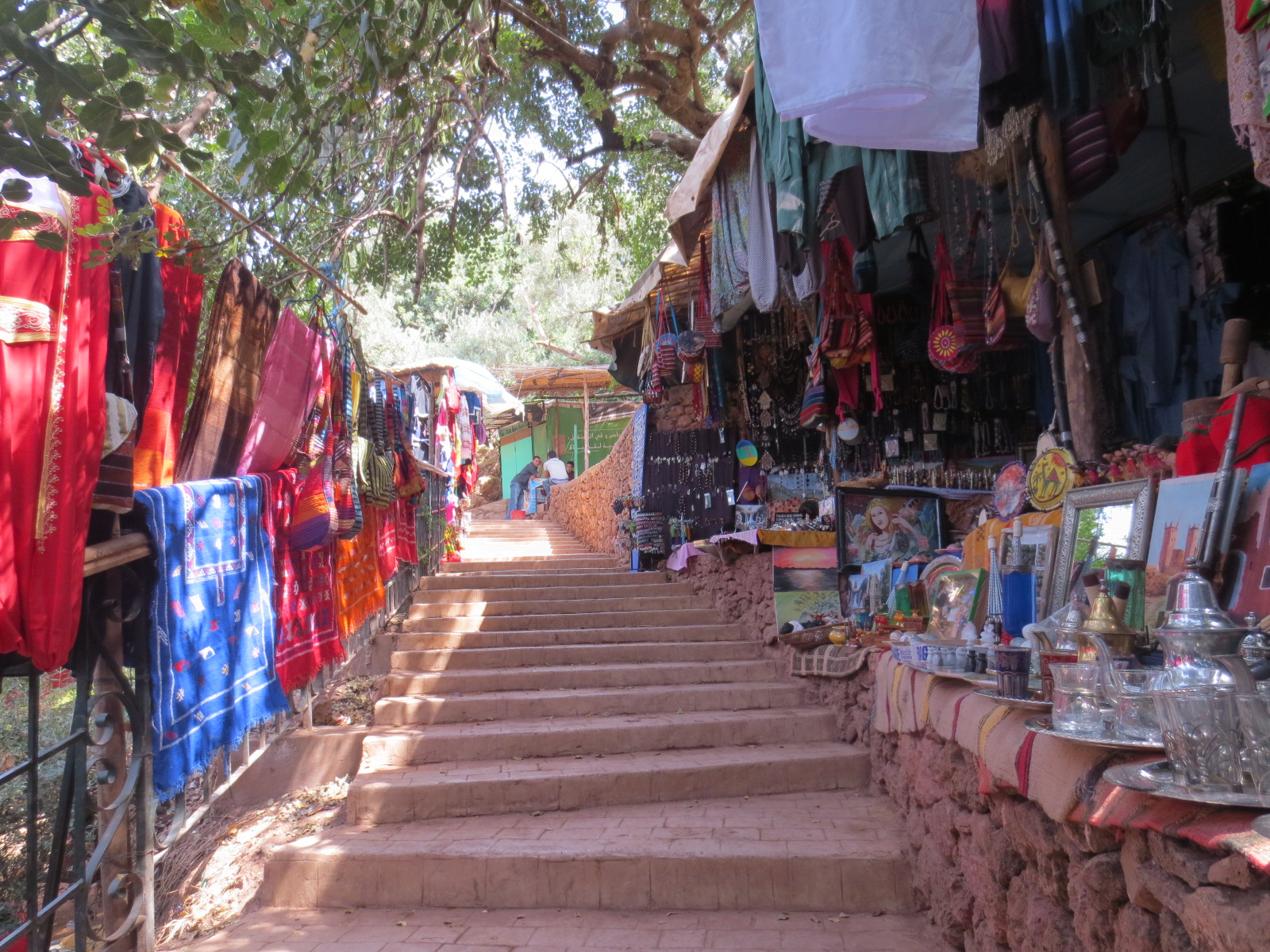 Ouzoud Falls